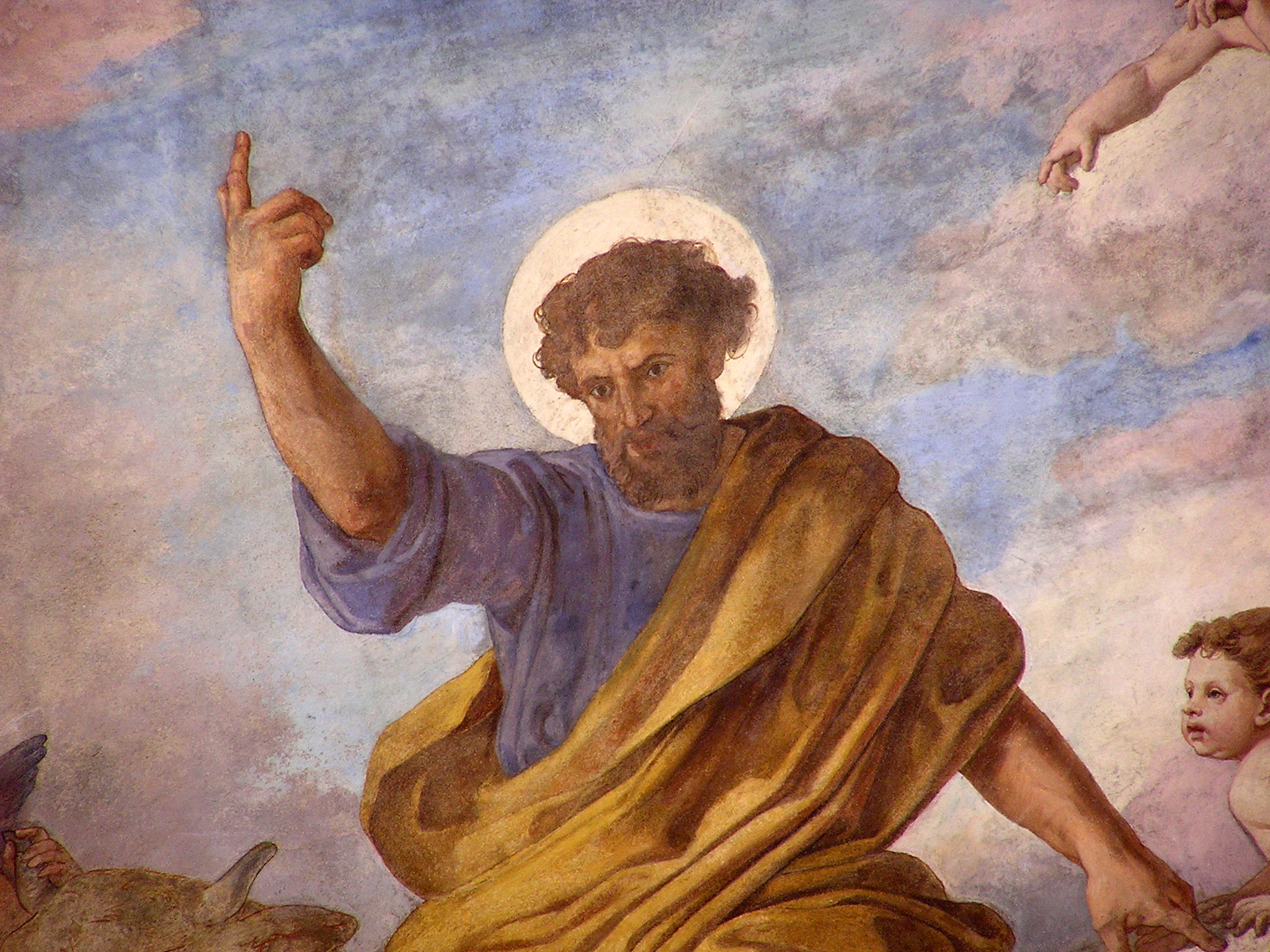 la foto raffigura un particolare di un affresco eseguito da Francesco Podesti sulle vele della cupola della Chiesa del SS. Sacramento, ad Ancona. Il dipinto rappresenta l'evangelista San Luca. Nelle altre tre vele della cupola F. Podesti dipinse gli altri tre evangelisti. Il pittore al momento di eseguire questi affreschi aveva più di ottanta anni e perciò essi possono essere considerati come il suo testamento artistico.